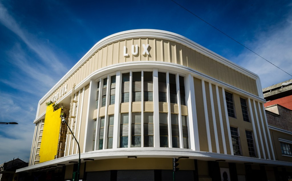 Teatro Lux en el Centro Histórico de Guatemala, Zona 1 (desde junio del 2013 sede del Centro Cultural de España en Guatamala).